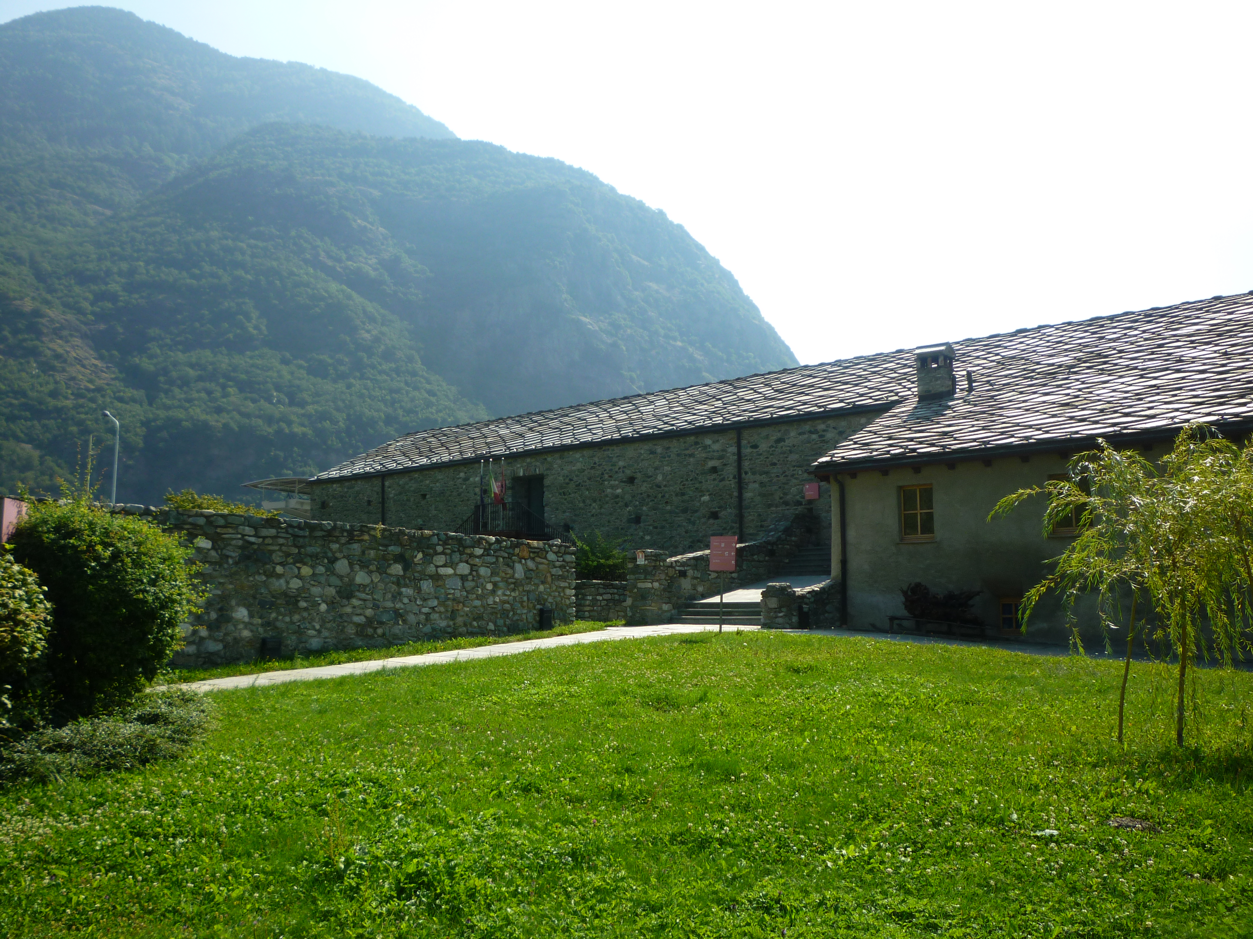 Centre polyvalent de la Murasse - Verrès (Vallée d'Aoste)